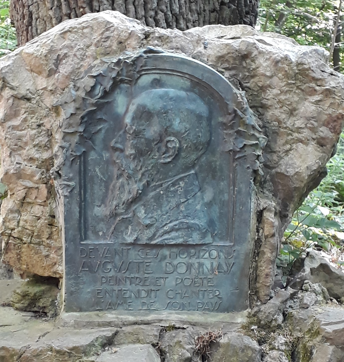 Mémorial Auguste Donnay Il est situé Bois des Manants à 4130 Esneux (Méry) - Belgique Il a été réalisé par Georges Petit et inauguré le4 septembre 1927